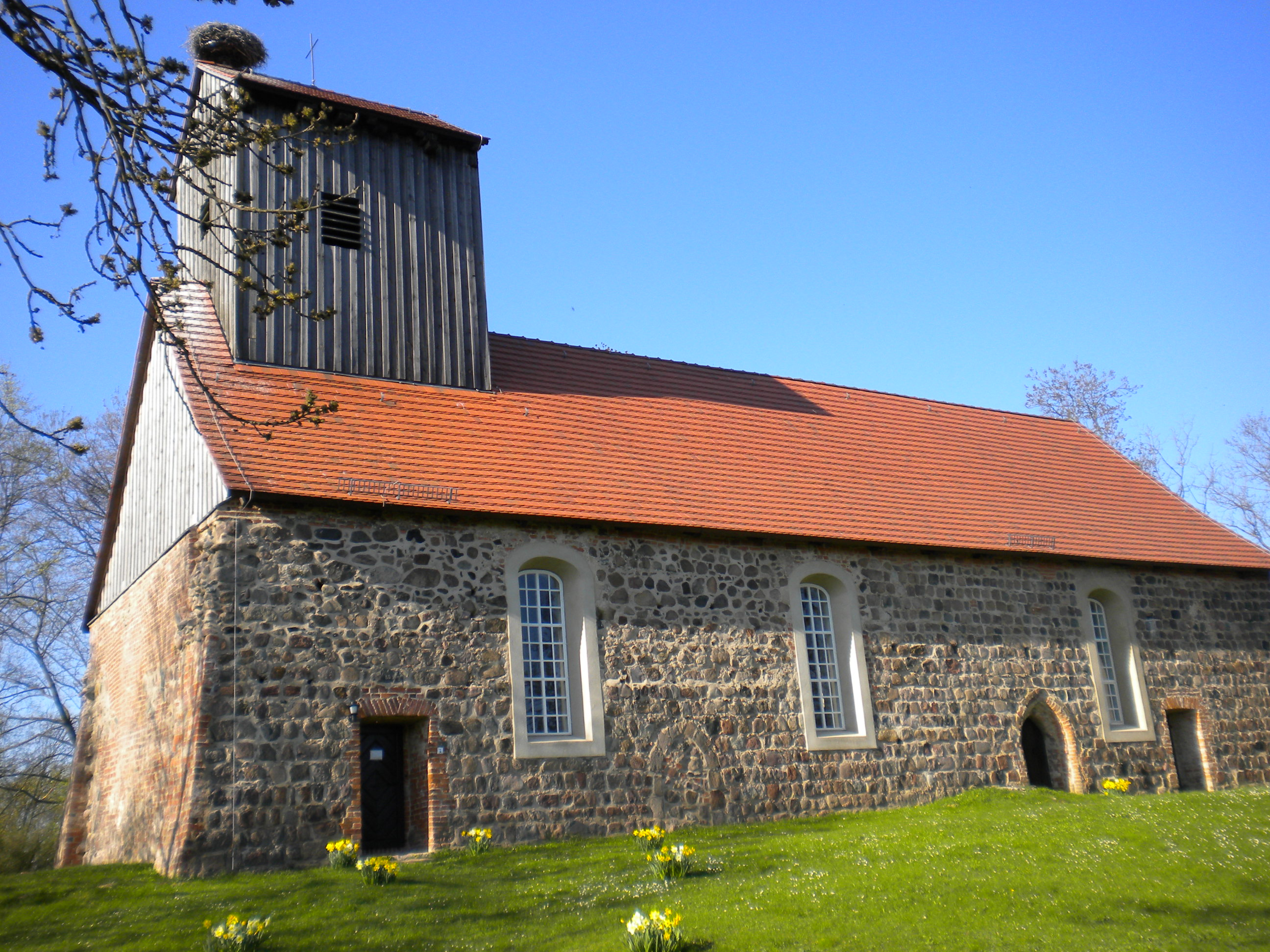 Denkmalgeschützte Feldsteinkirche in Groß Fredenwalde, Gemeinde Gerswalde, Landkreis Uckermark, Brandenburg